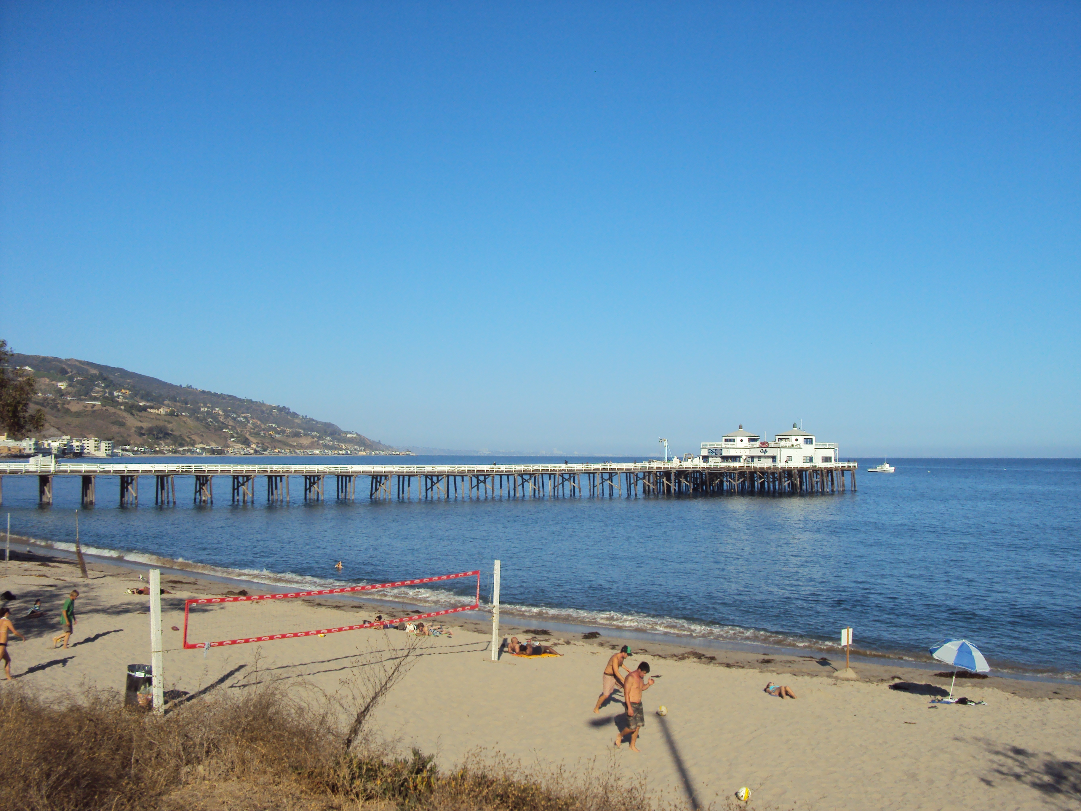 Malibu